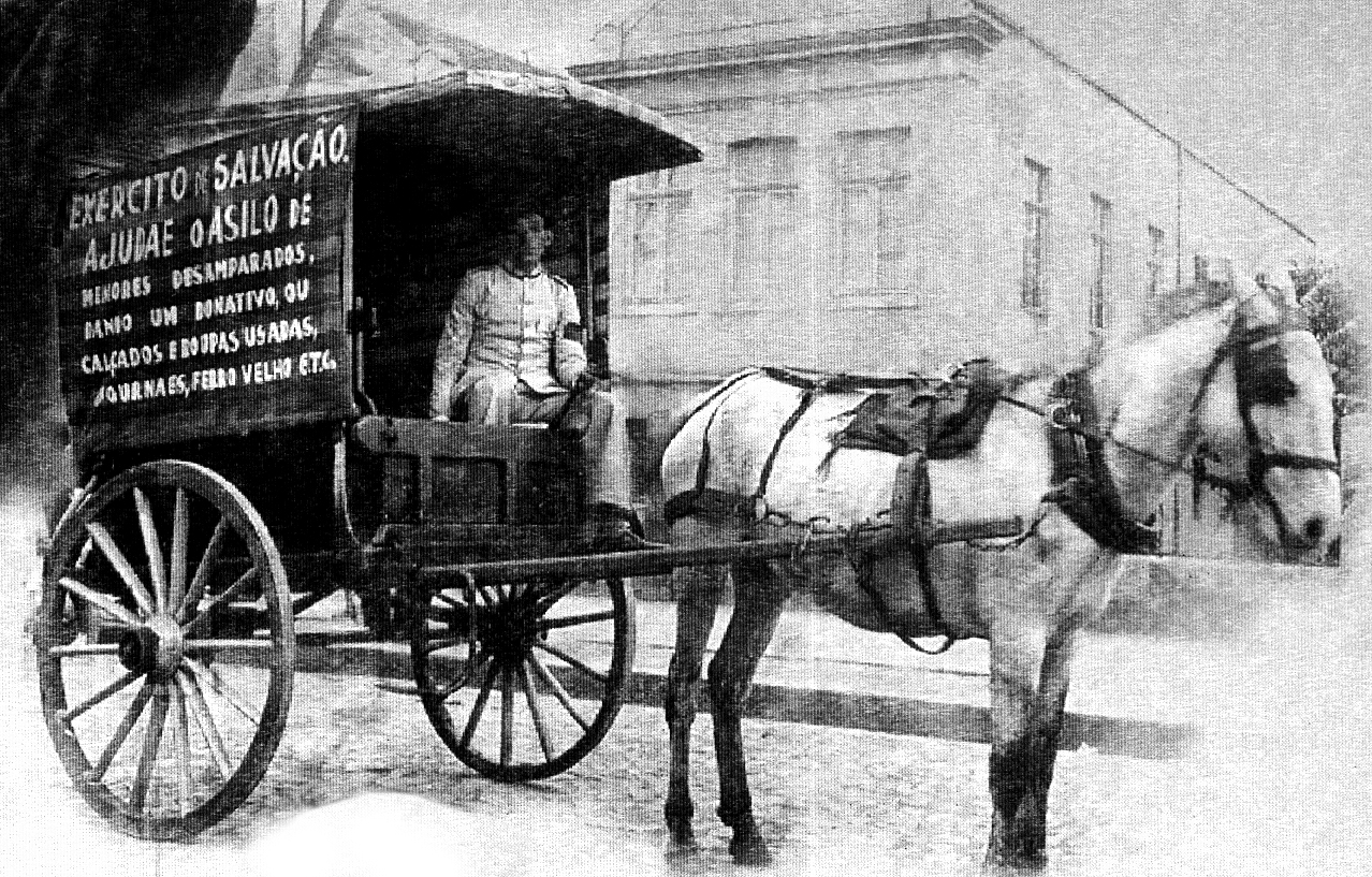 Foto de uma charrete do Exército de Salvação destinada à retirada de doações (1930).